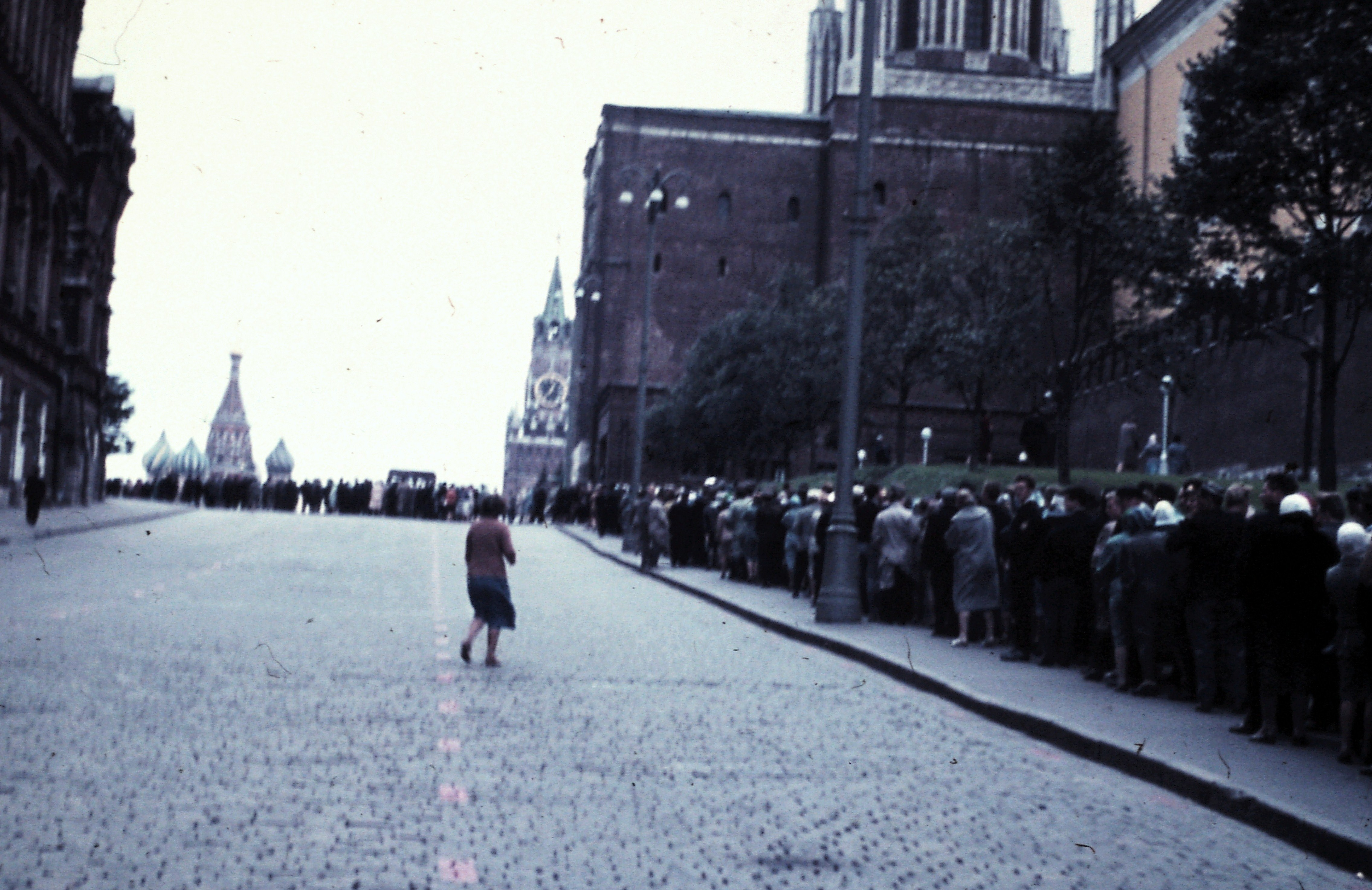 Foto 1962